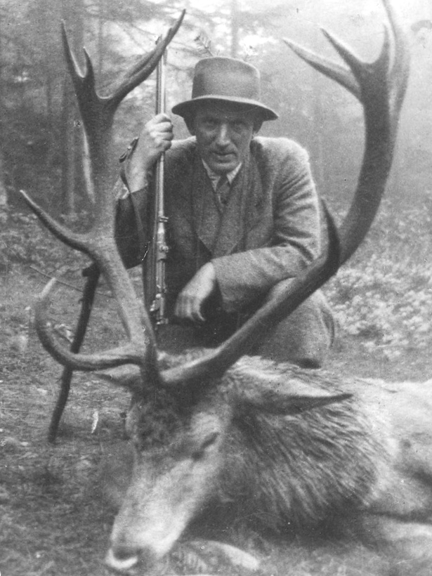 František Neuwirth na lovu v Brdech (datum na scanu je hrubý odhad)